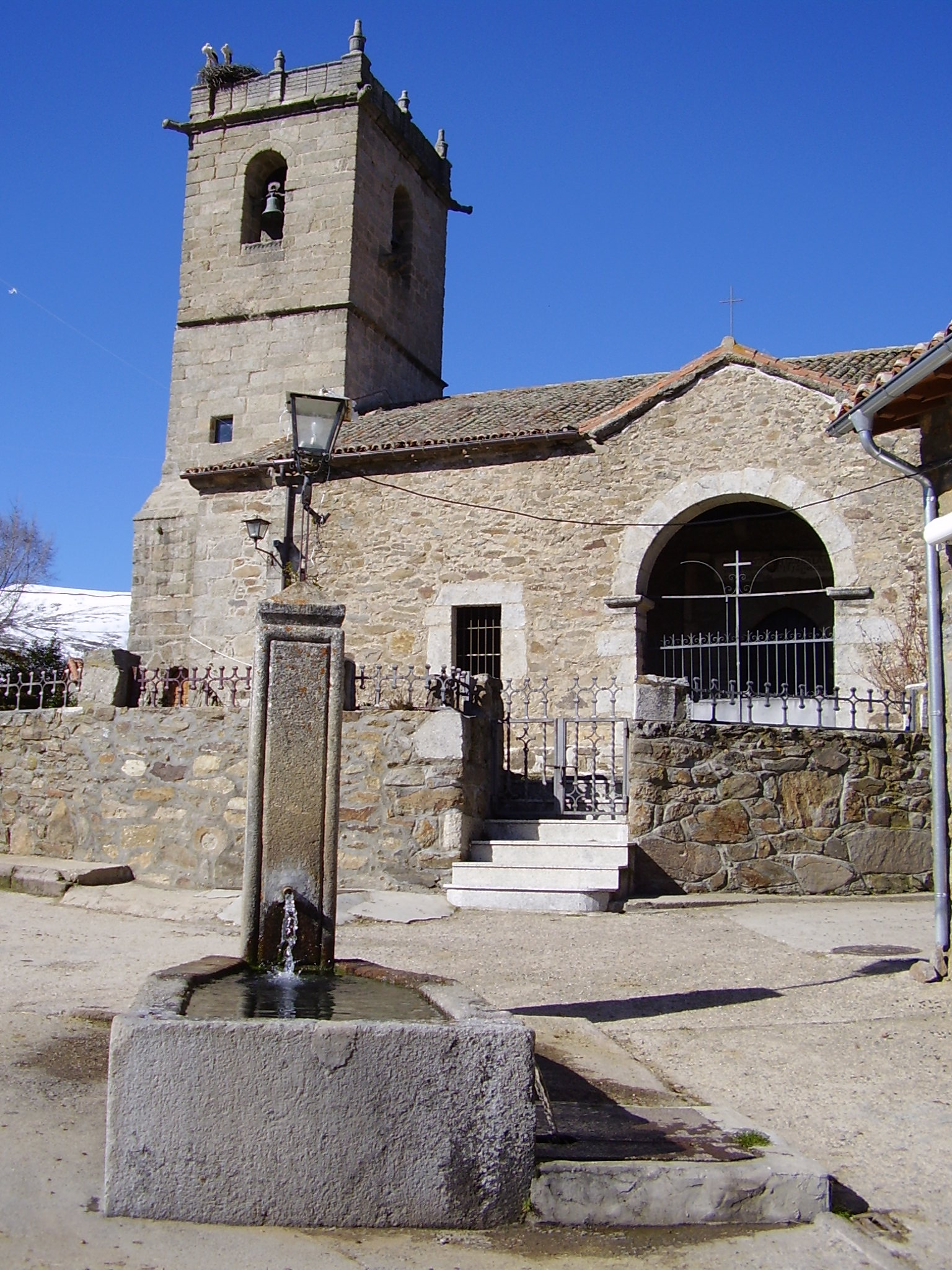 Santiago de Aravalle, Puerto Castilla, Ávila, Castilla y León, España. N40°18'52.29" W5°36'49.56"